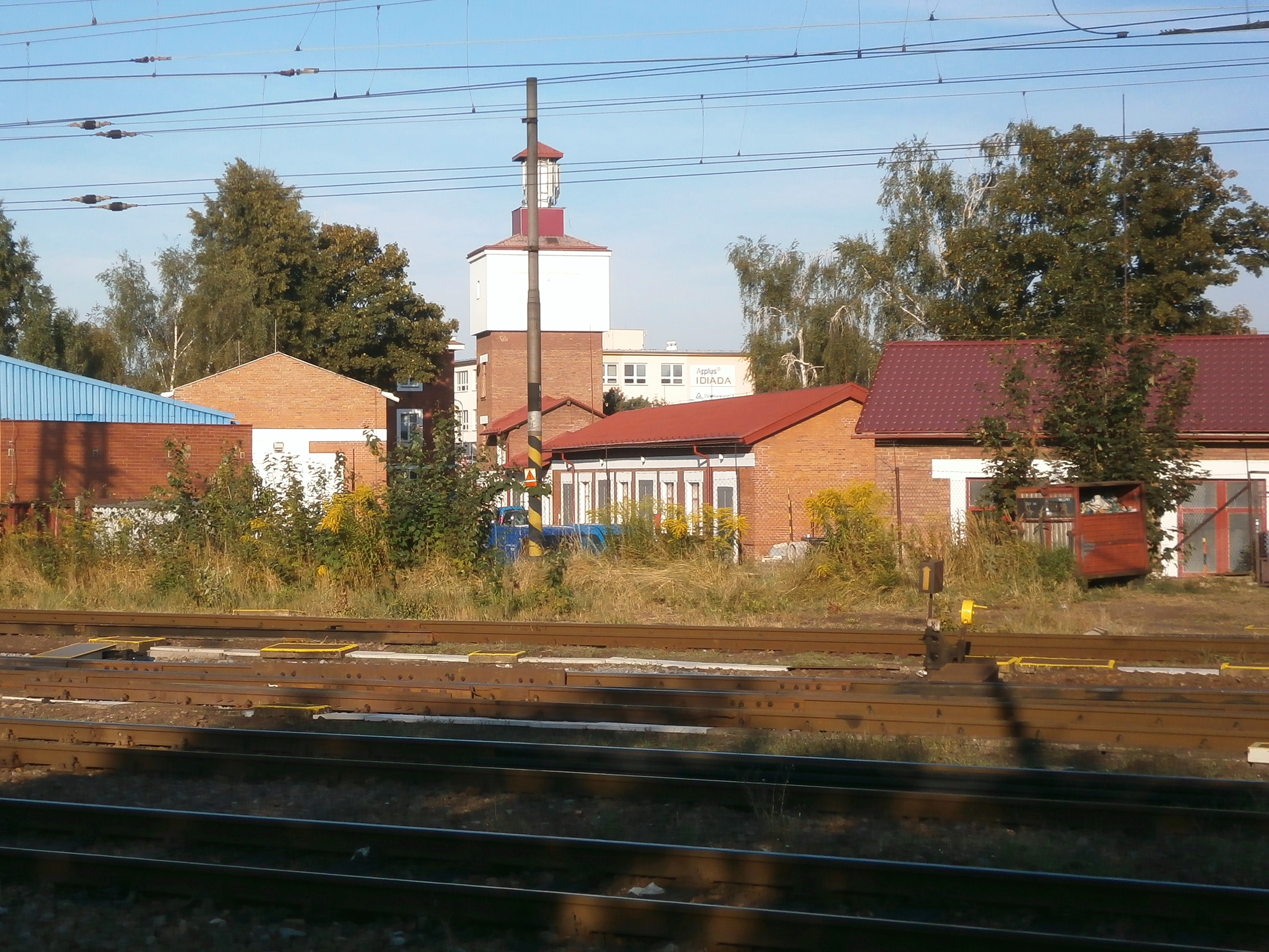 Městská plynárna v Kuklenách